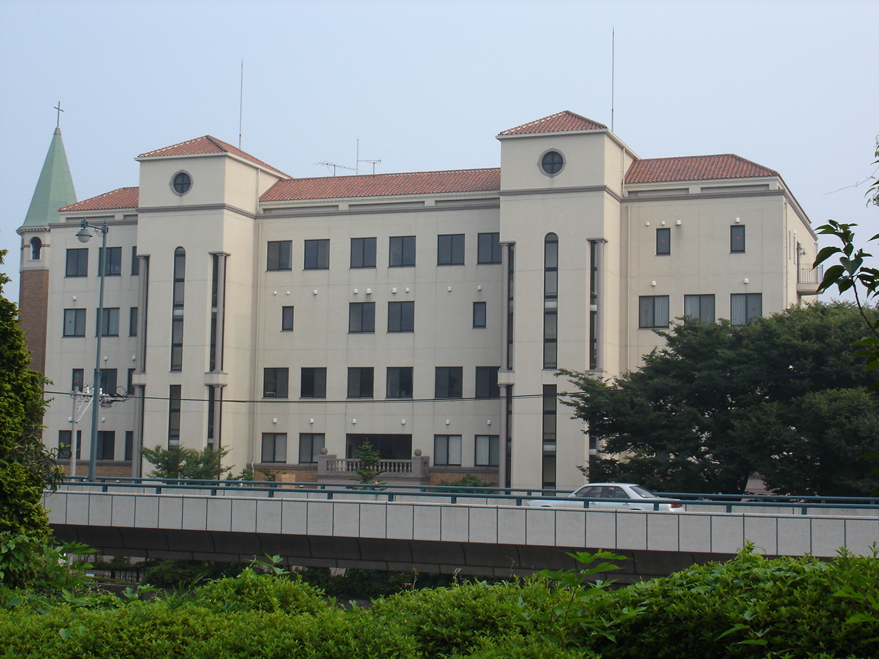 梅光学院大学（2007年7月29日）